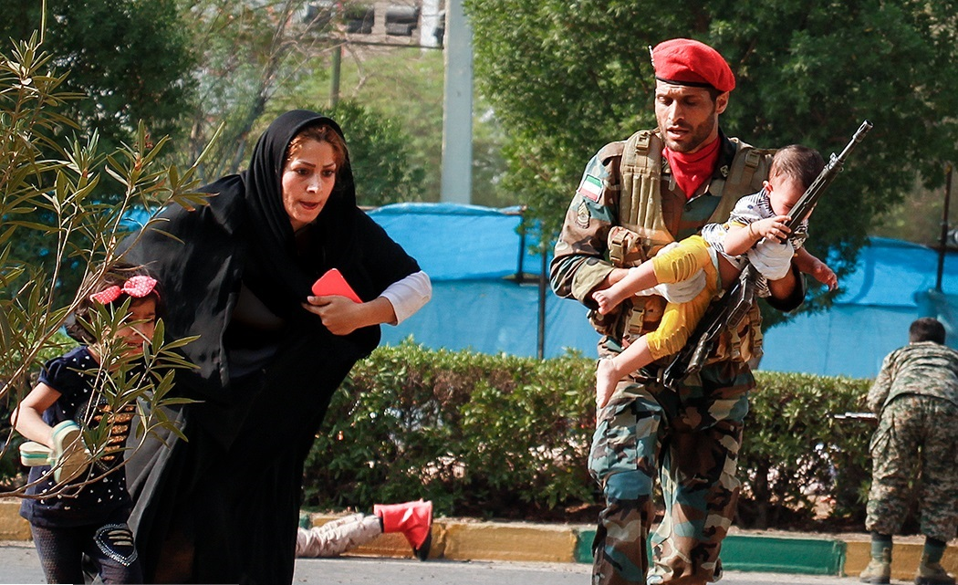 همزمان با برگزاری مراسم رژه نیروهای مسلح در اهواز، صبح امروز شنبه ۳۱ شهریور ۱۳۹۷ یک تیم تروریستی به مردم و حاضران در مراسم رژه حمله مسلحانه کرد. پس از آغاز مراسم رژه نیروهای مسلح دو نفر از پارک شهید سبحانی که پشت استیج رژه قرار دارد با به رگبار بستن مردم قصد حمله به جایگاه رژه را داشتند که نیروهای مسلح مستقر در محل رژه با دعوت مردم به پناه گرفتن با افراد مسلح درگیر شدند.